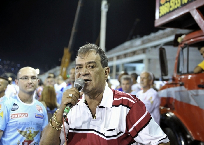 Ensaio técnico da União da Ilha do Governador no Sambódromo. Foto: Ricardo Almeida.